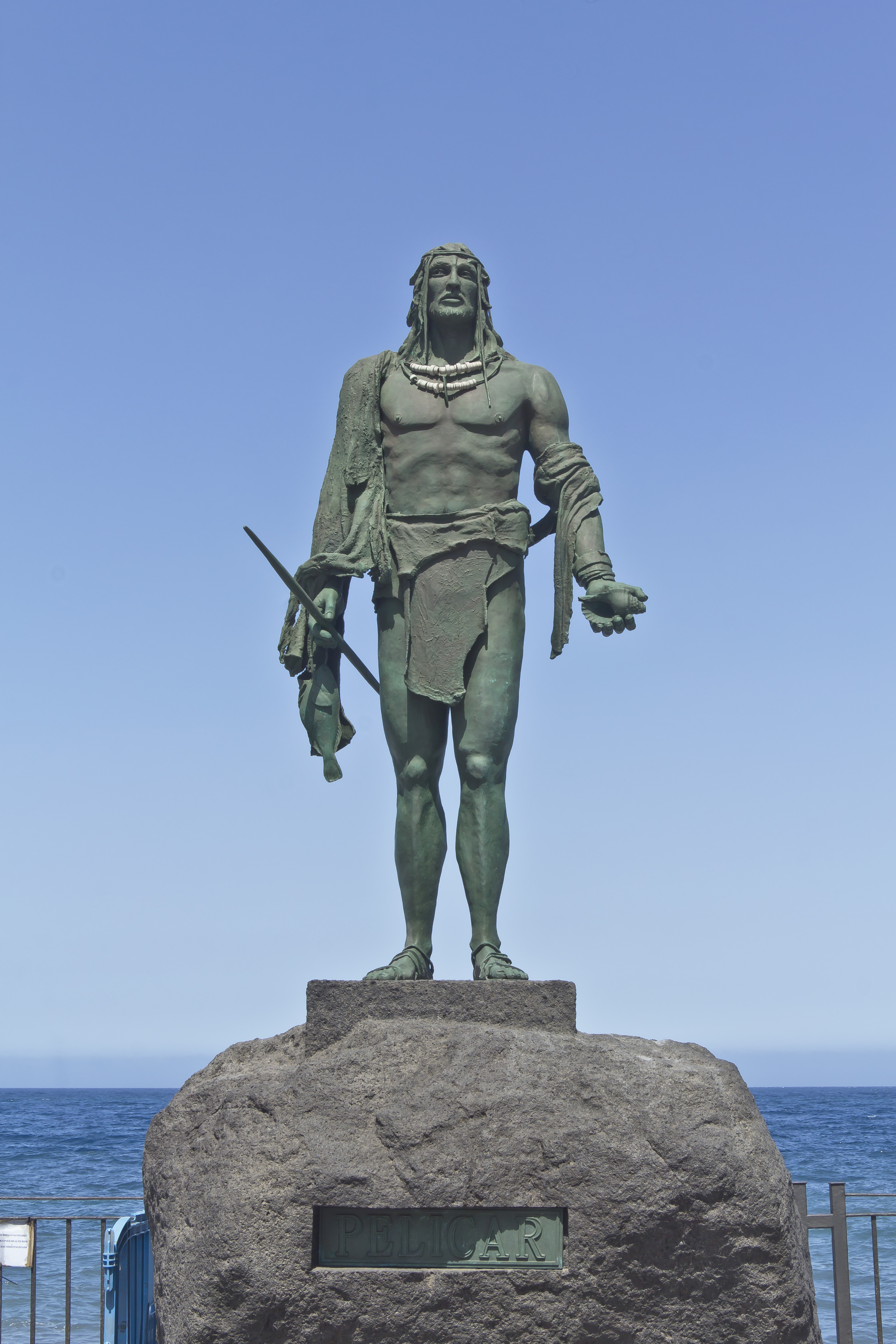 Die Plastik des Mencey Pelicar auf der Plaza de la Patrona de Canarias in Candelaria, Teneriffa, Spanien wurde von José Abad geschaffen.